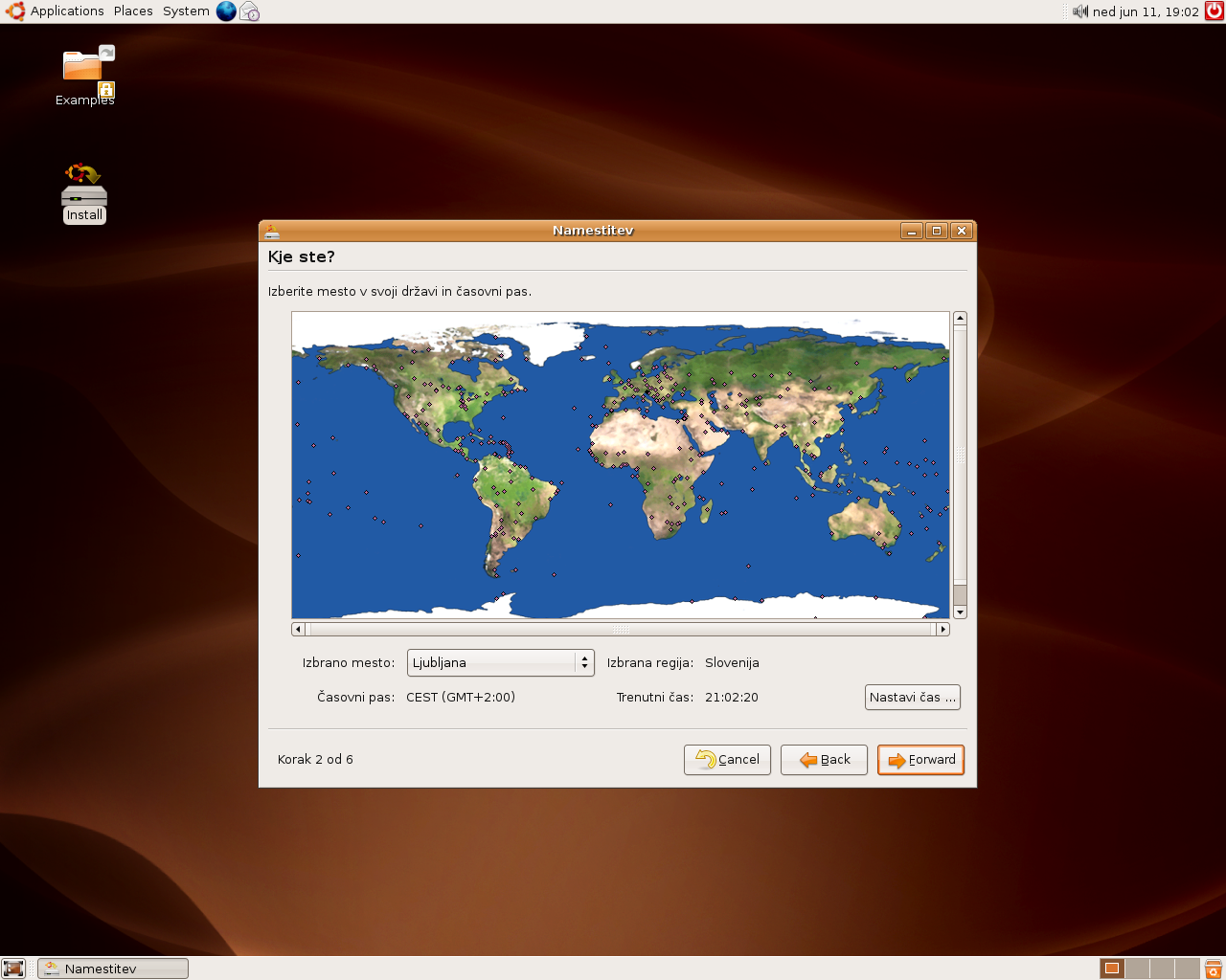 Screenshot sem sam opravil.